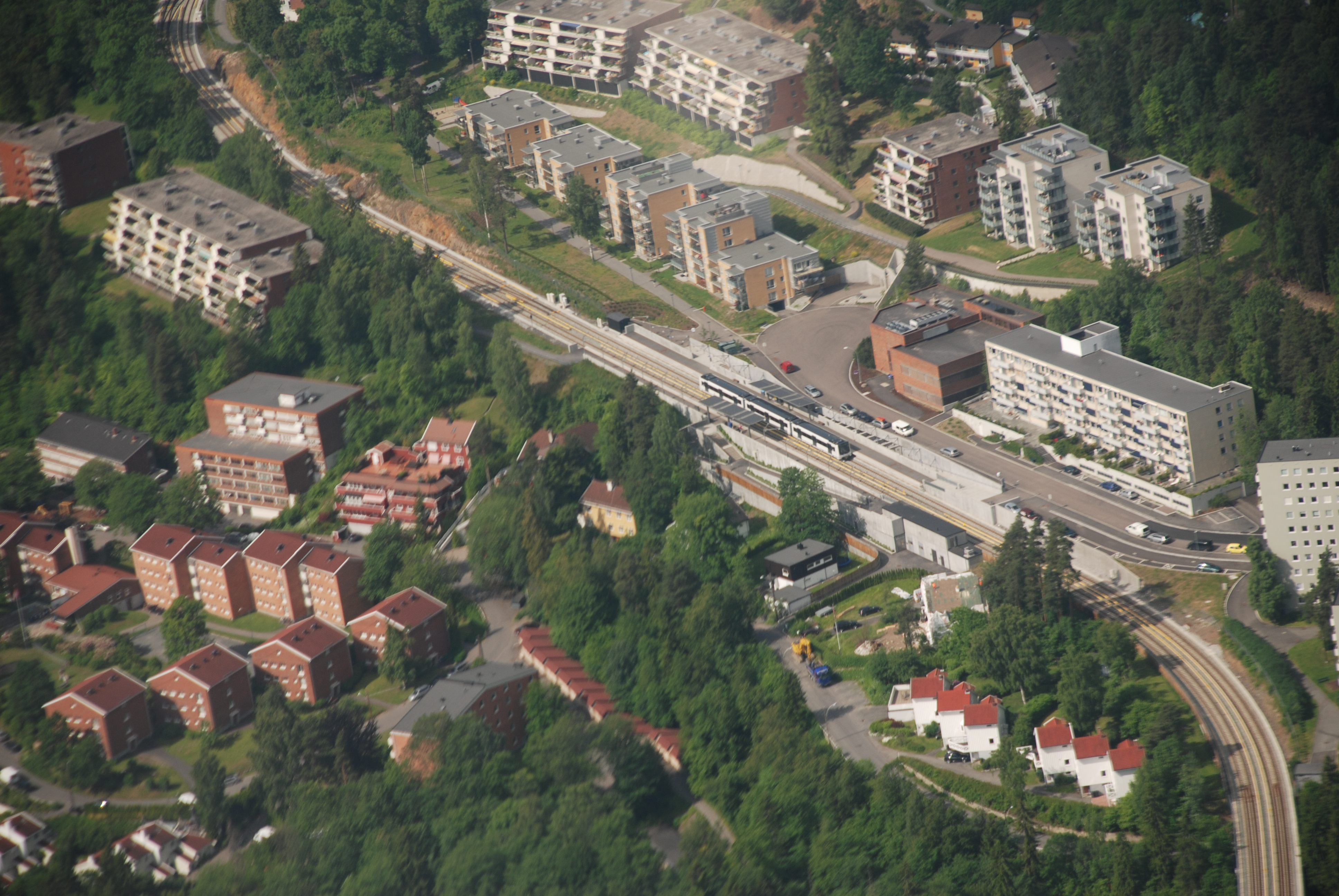 Ullernåsen i Bydel Ullern i Oslo. Ullernåsen stasjon i sentrum av bildet